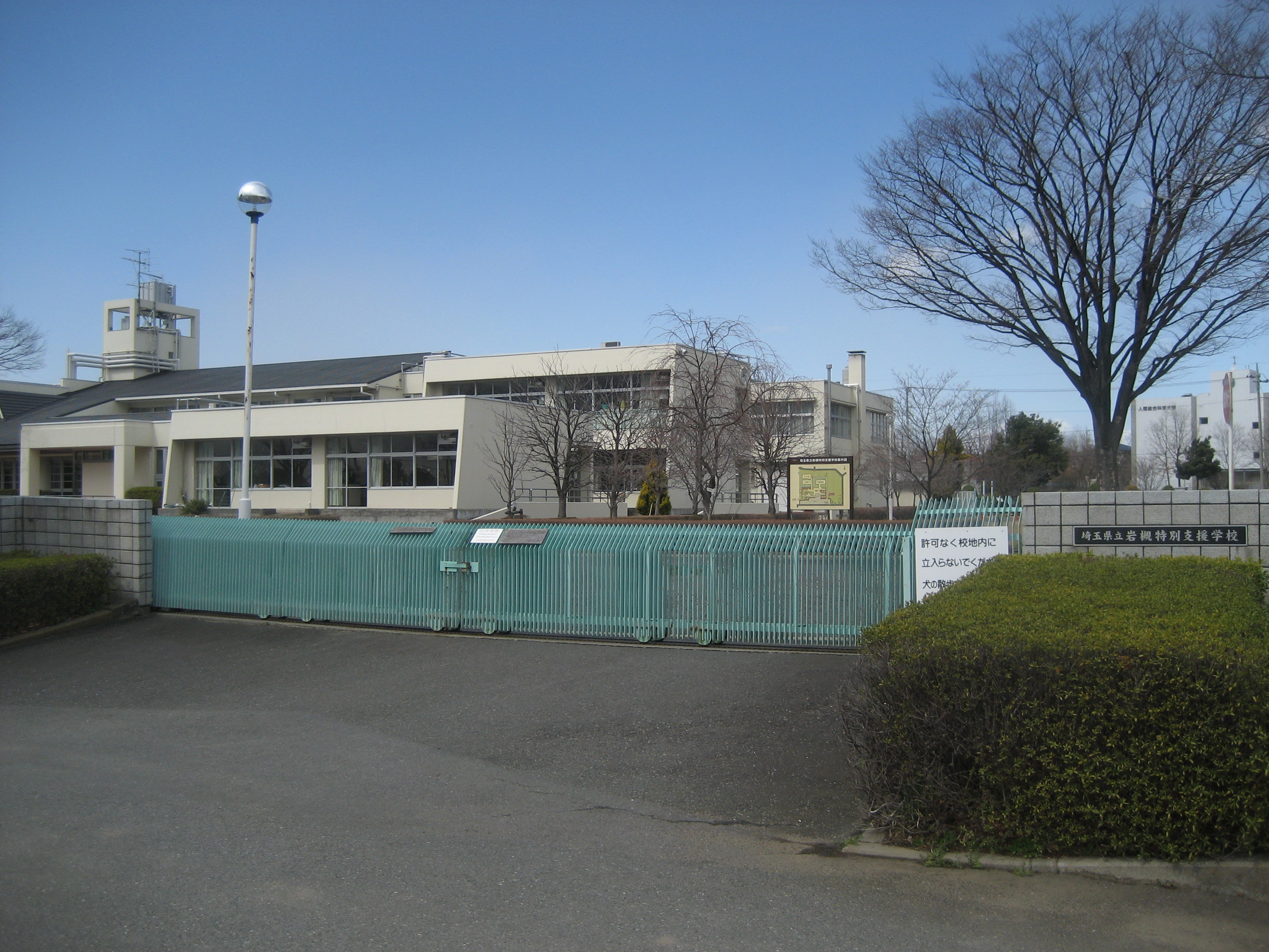 埼玉県立岩槻特別支援学校校舎（正門付近から撮影）